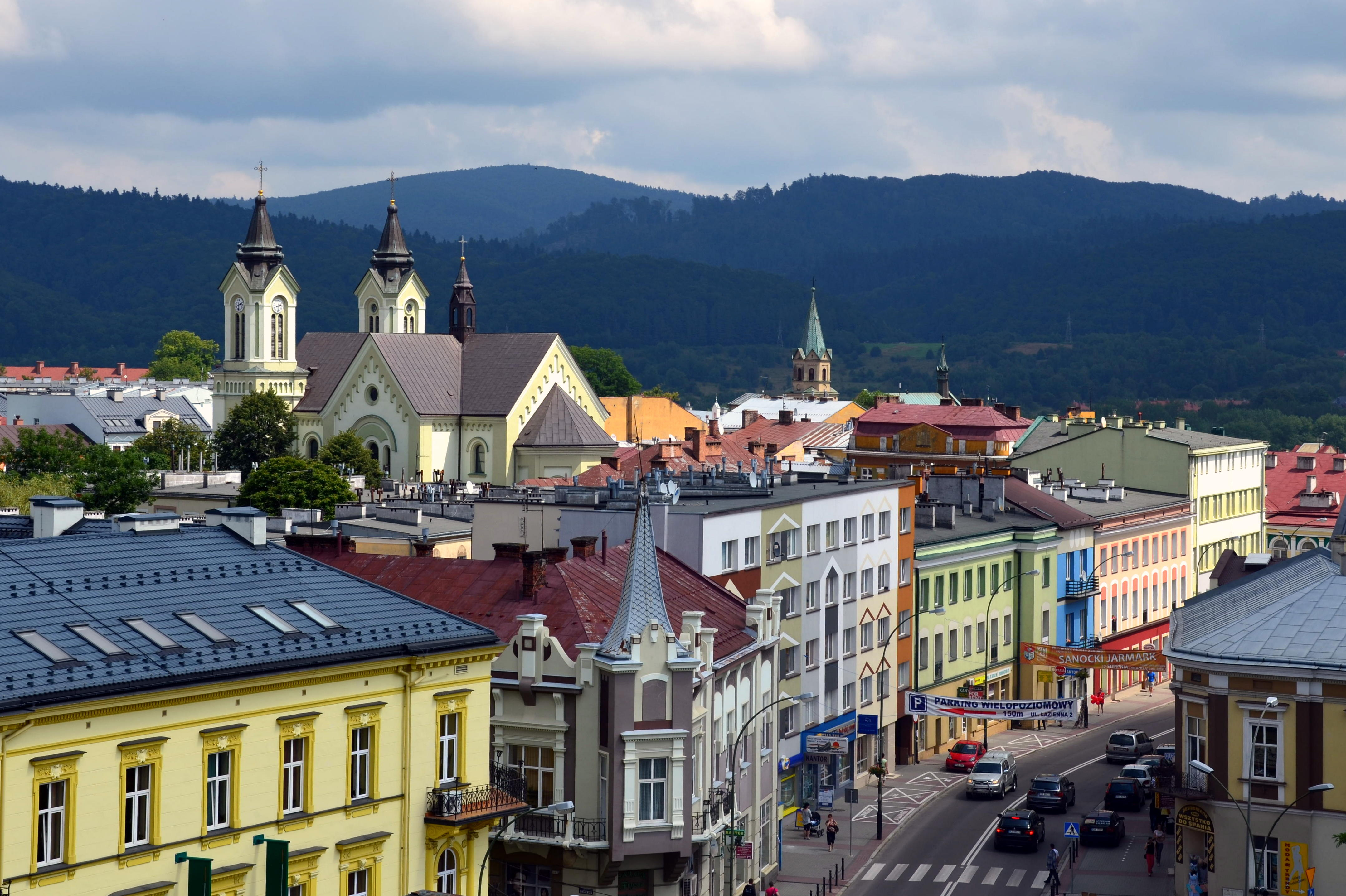 Sanok, von Kościuszkistrasse aus gesehen